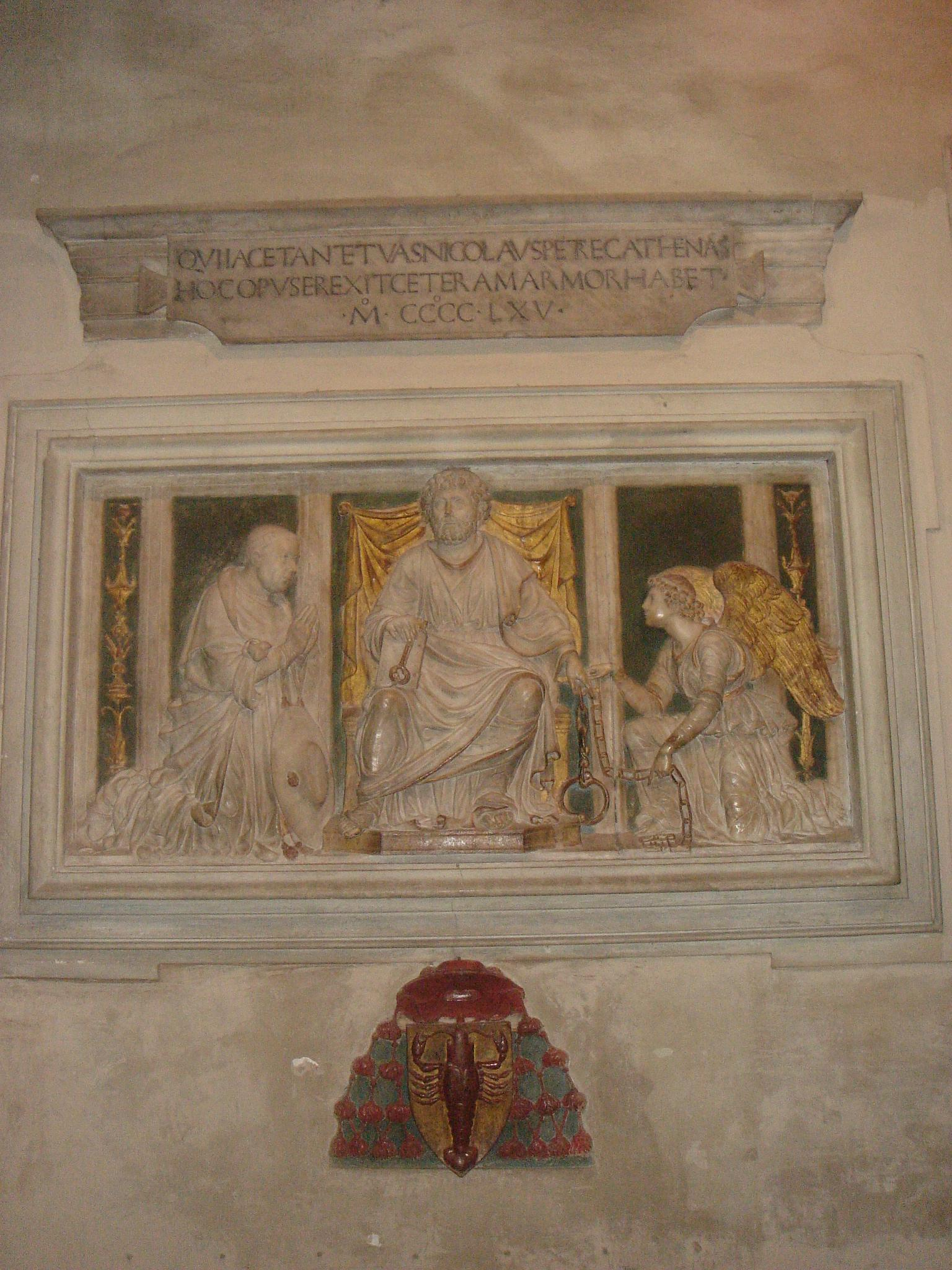 Roma, San Pietro in Vincoli (rione Monti): tomba di Niccolò Cusano (Andrea Bregno)